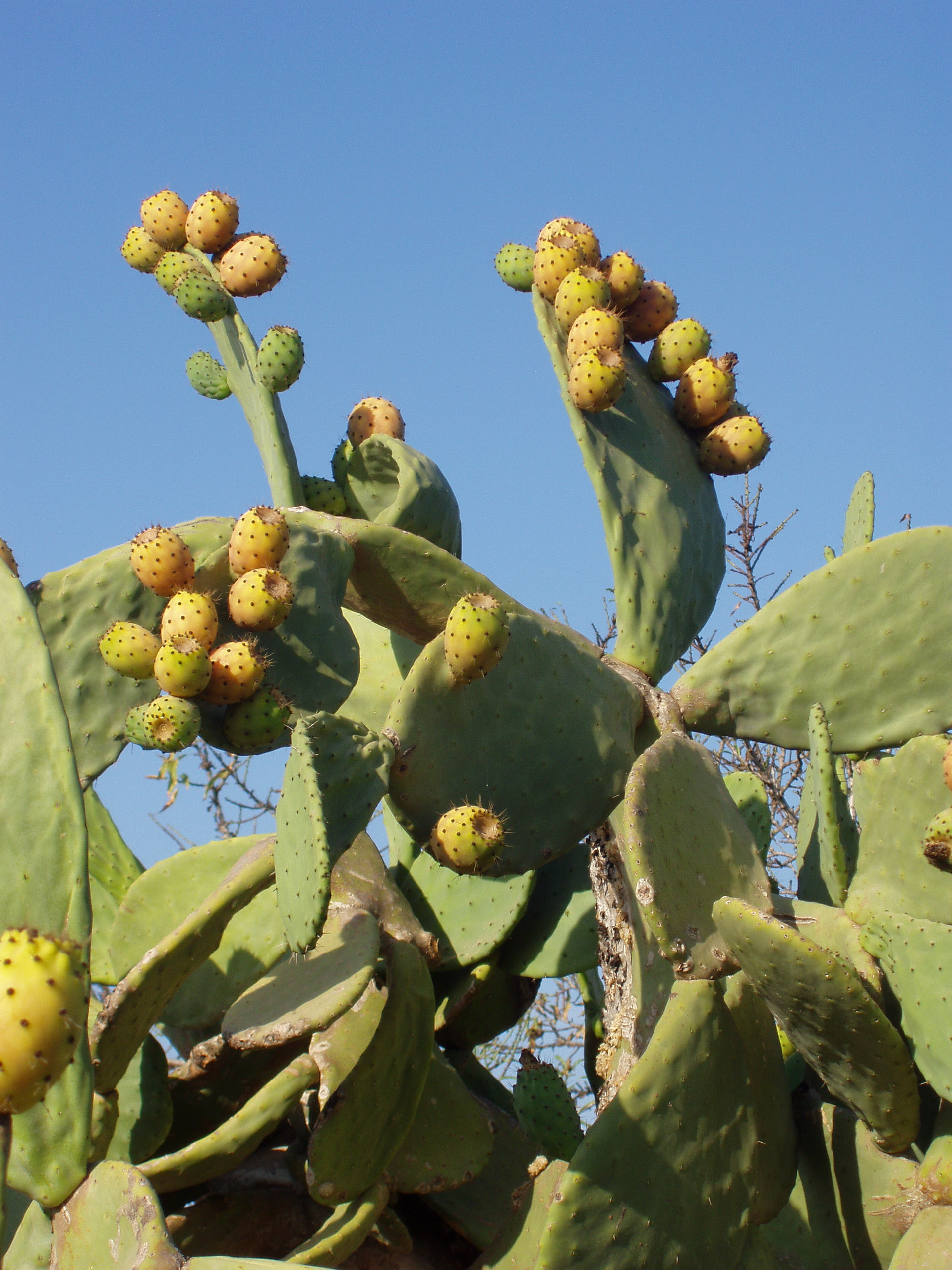 Ejemplar de chumbera (Opuntia ficus-indica). Isla de Formentera , Baleares, España.